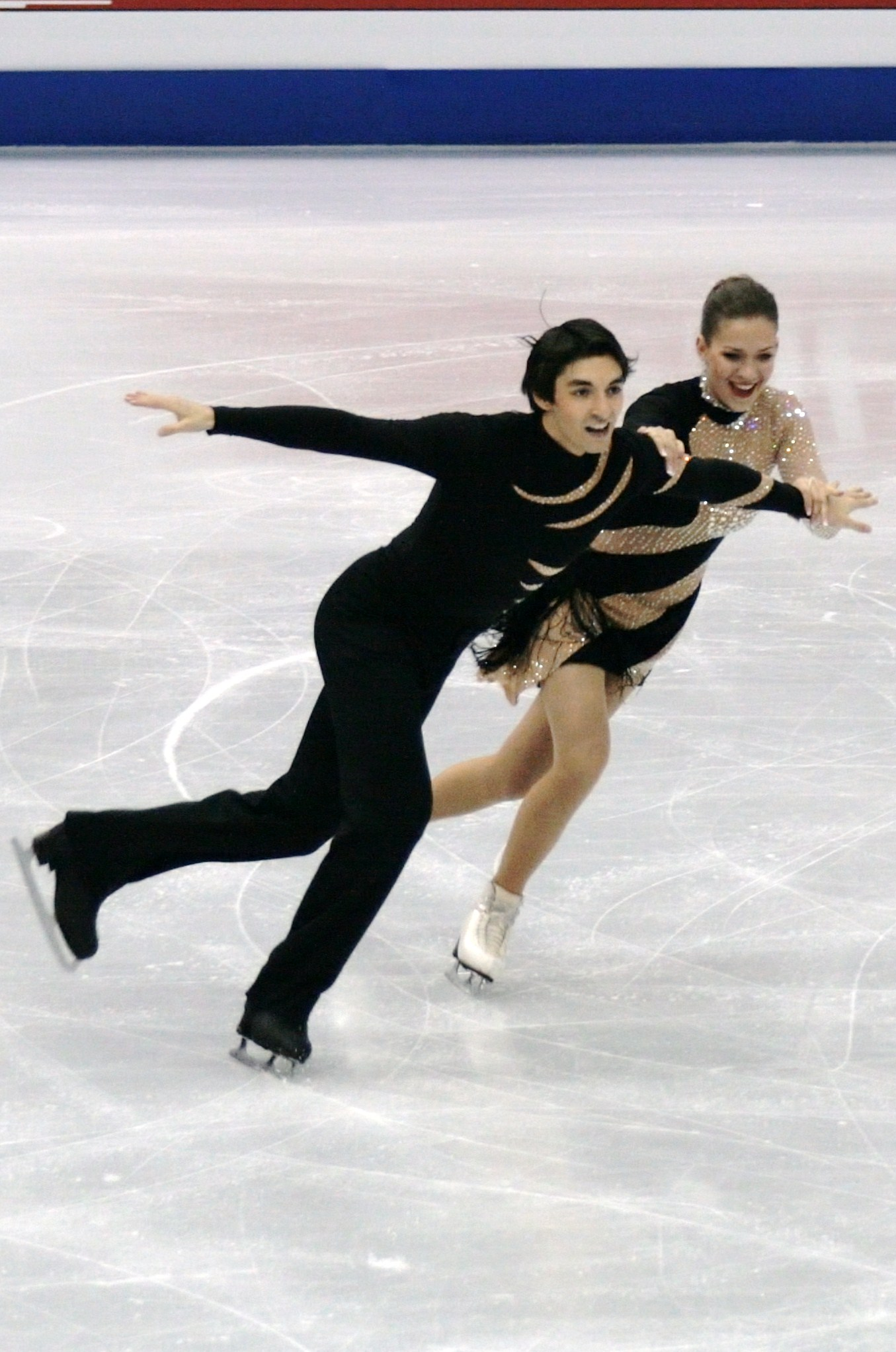 Алиса Агафонова и Альпер Учар (Турция) на чемпионате мира по фигурному катанию 2012, предварительный раунд.